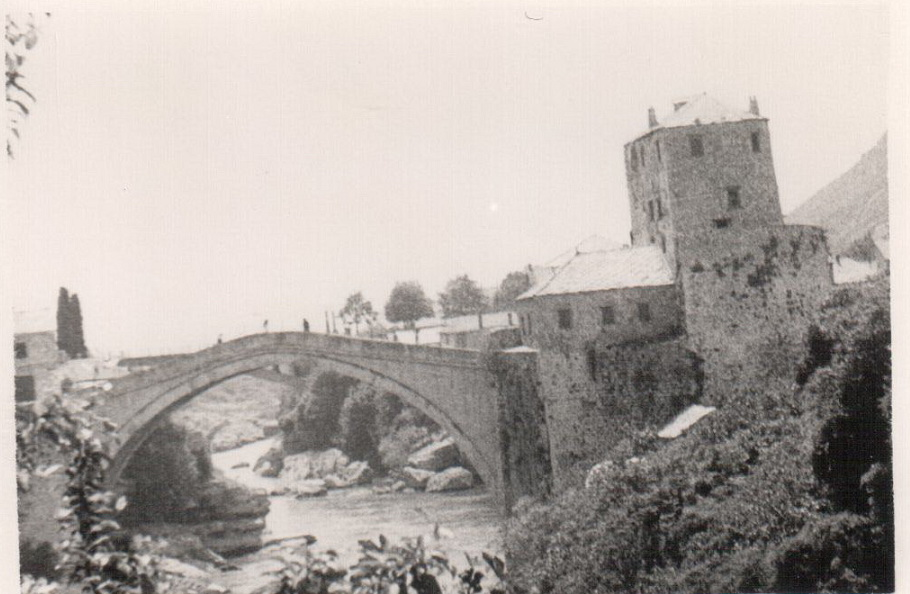 Драган Цветковић Ниш Сопствена слика Скенирана је црно-бела сопствена фотографија старог моста из 1973. године Licensing